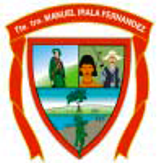 Escudo de la Municipalidad de Teniente Primero Manuel Irala Fernández.